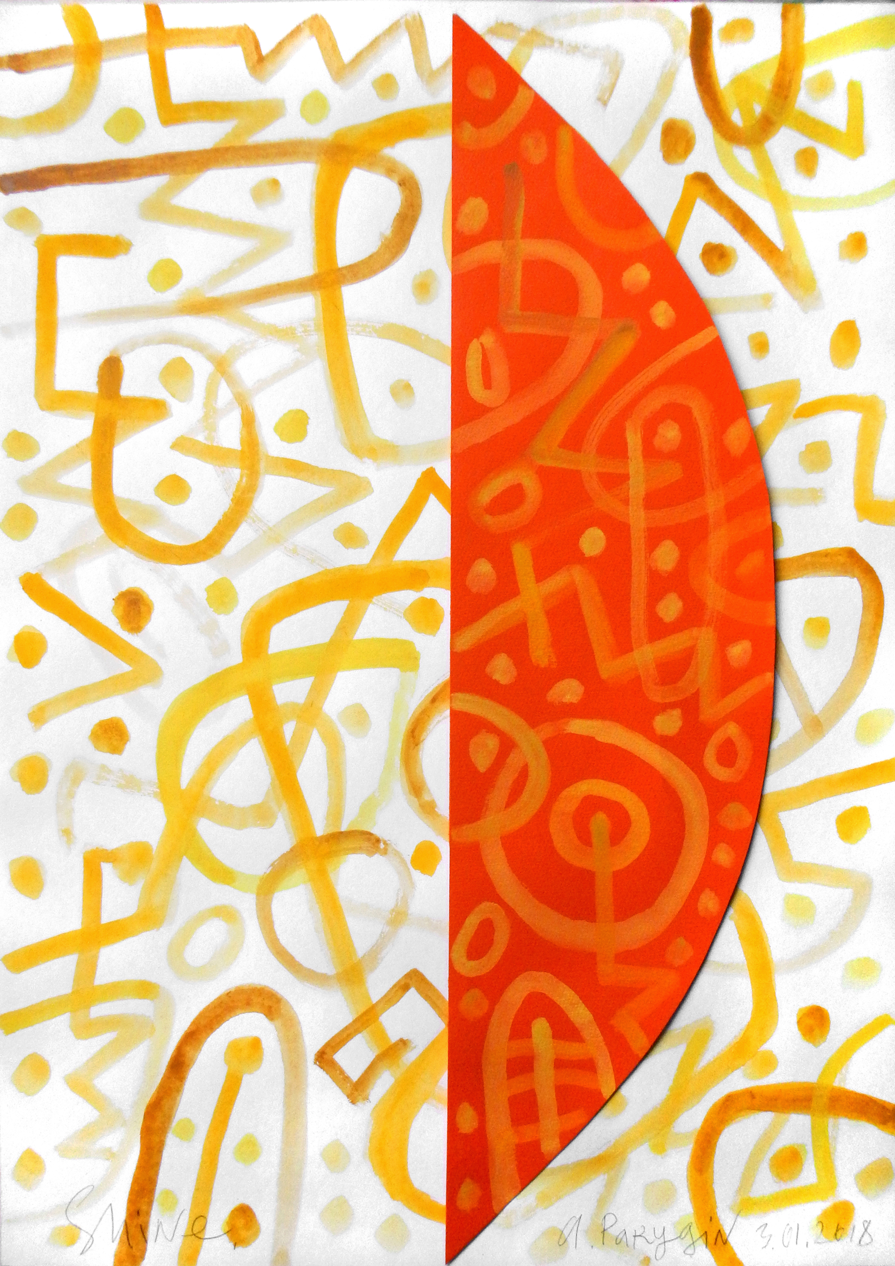 абстрактное искусство, современное искусство